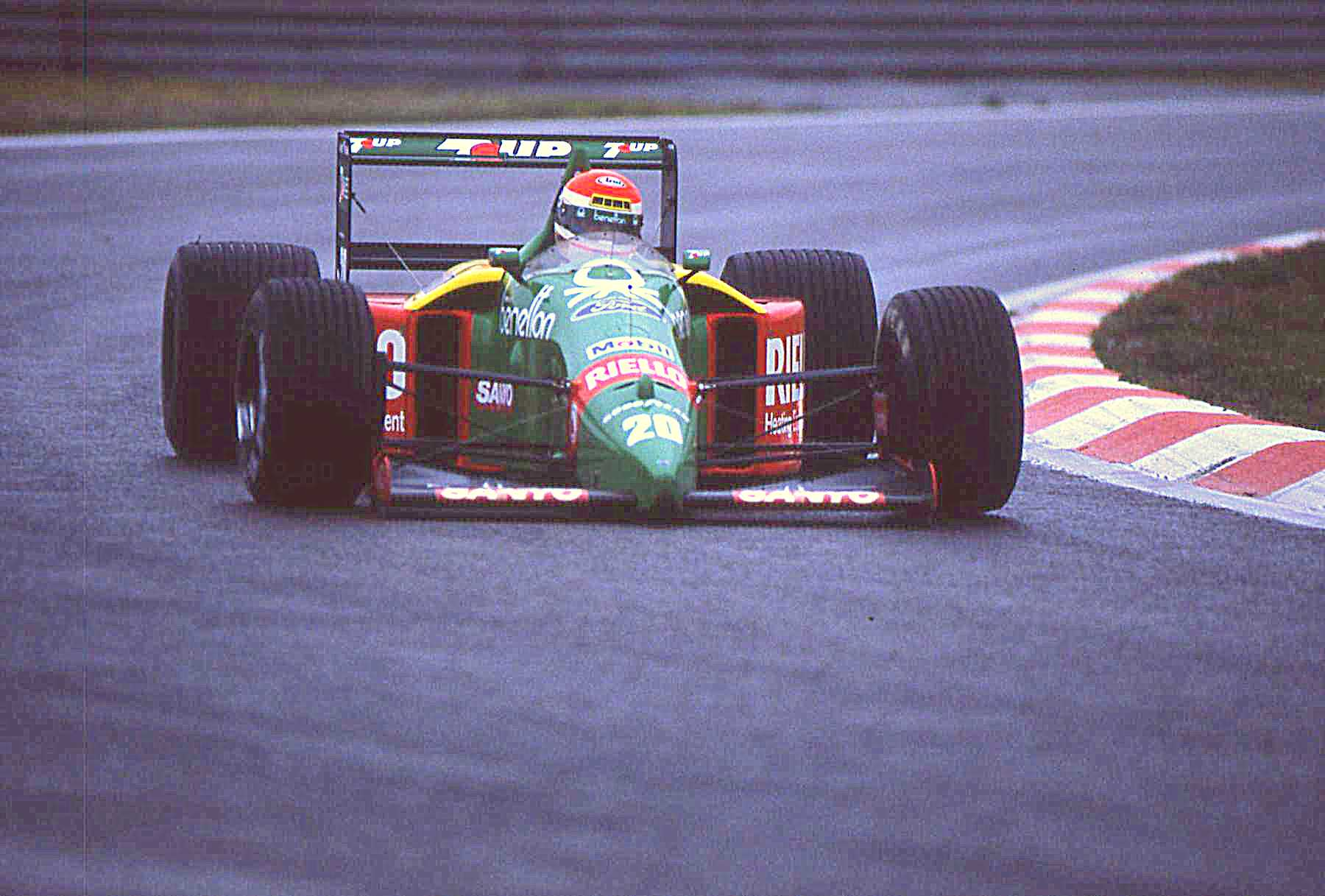 Emanuele Pirro - Benetton-Ford. Scan diapo argentique.